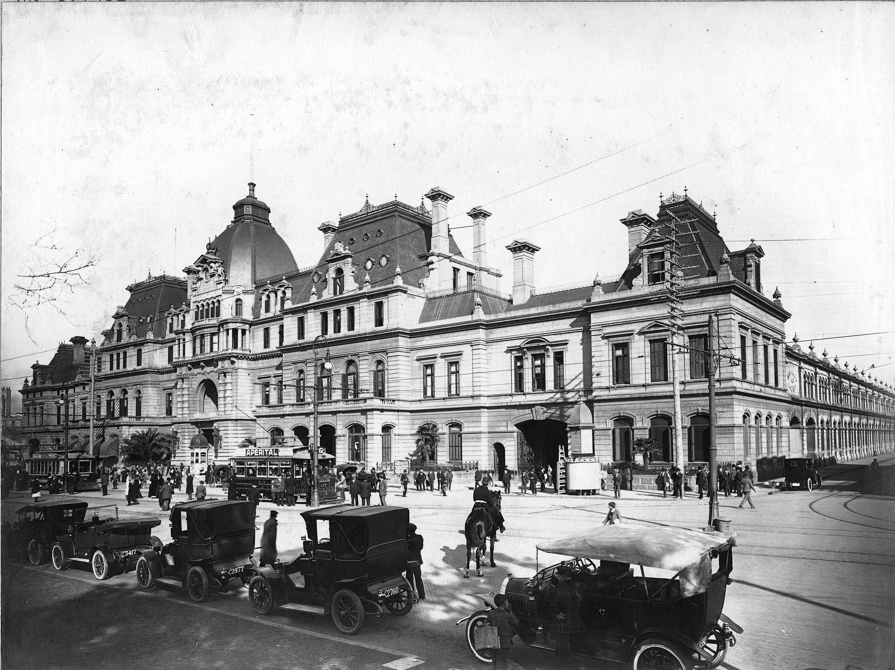 Fachada de la estación Plaza Constitución de Buenos Aires, ca. 1920. Se ve el lateral original, modificado totalmente a partir de 1925. AGN Inventario 214123.